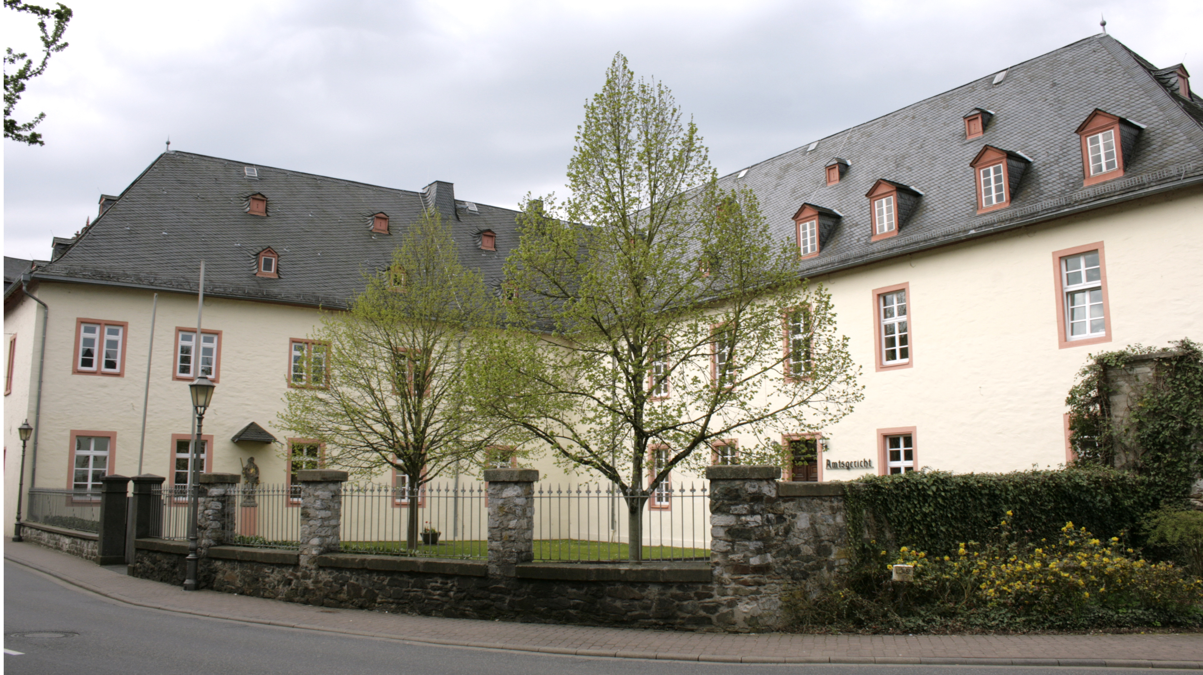 Schloss Hadamar, "Neuer Bau", heute Amtsgericht, Deutschland